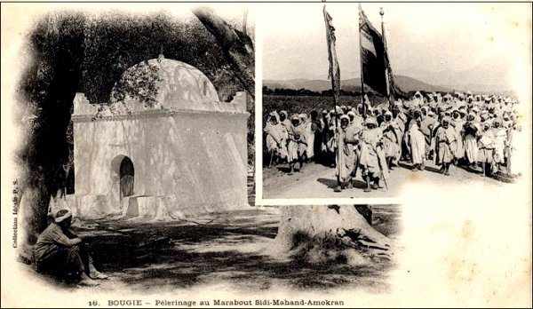 Visite au marabout Sidi Amokrane aux environs de Béjaïa au début du XXe siècle.